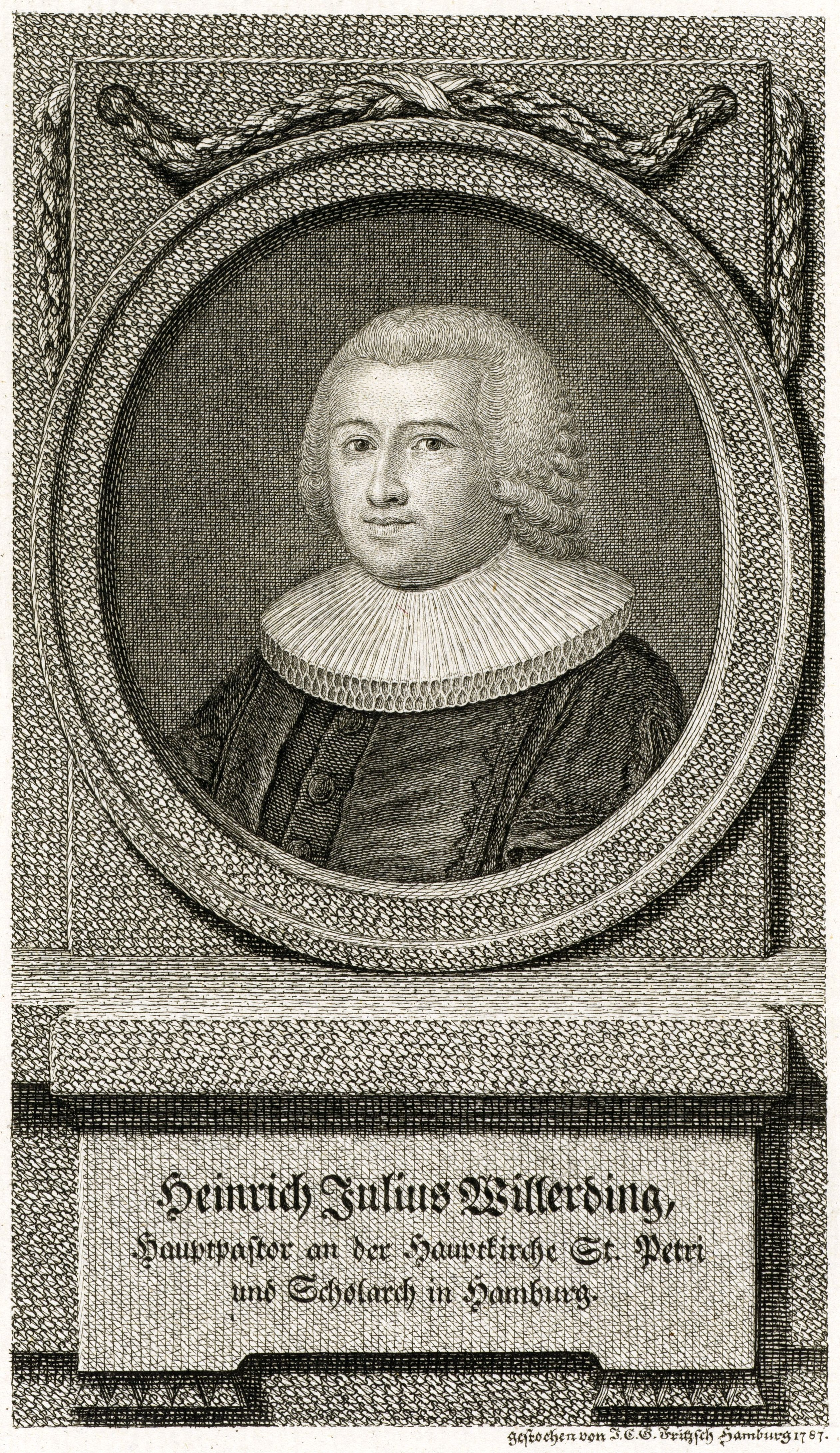 Heinrich Julius Willerding, Hauptpastor an der Hauptkirche St. Petri und Scholarch in Hamburg